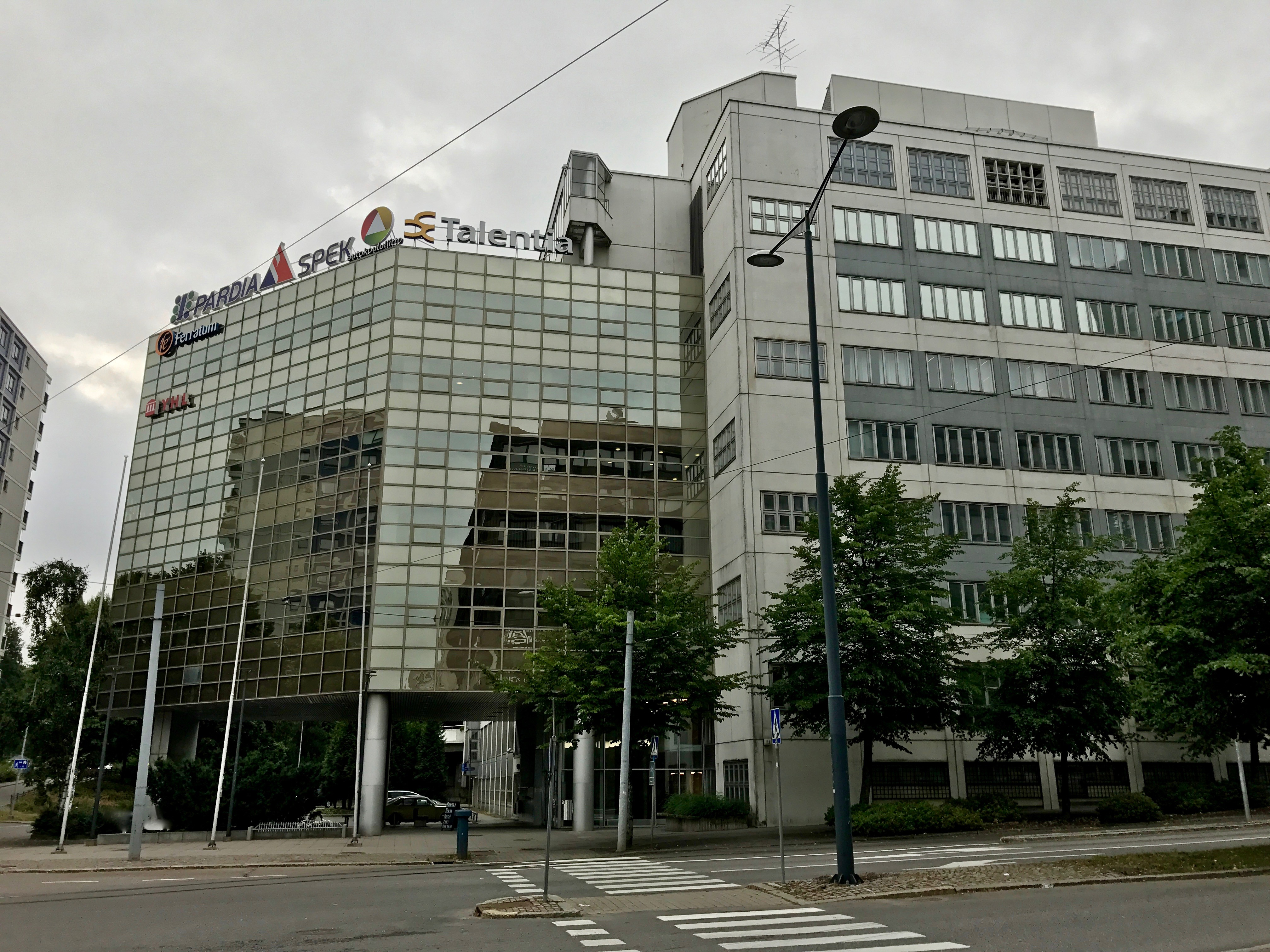 Toimistorakennus Helsingin Itä-Pasilassa, Ratamestarinkatu 11.